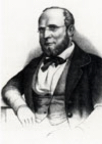 Johann Adam August Rühl (* 19. Februar 1815 in Hanau; † 20. Juli 1850), kurhessischer Politiker